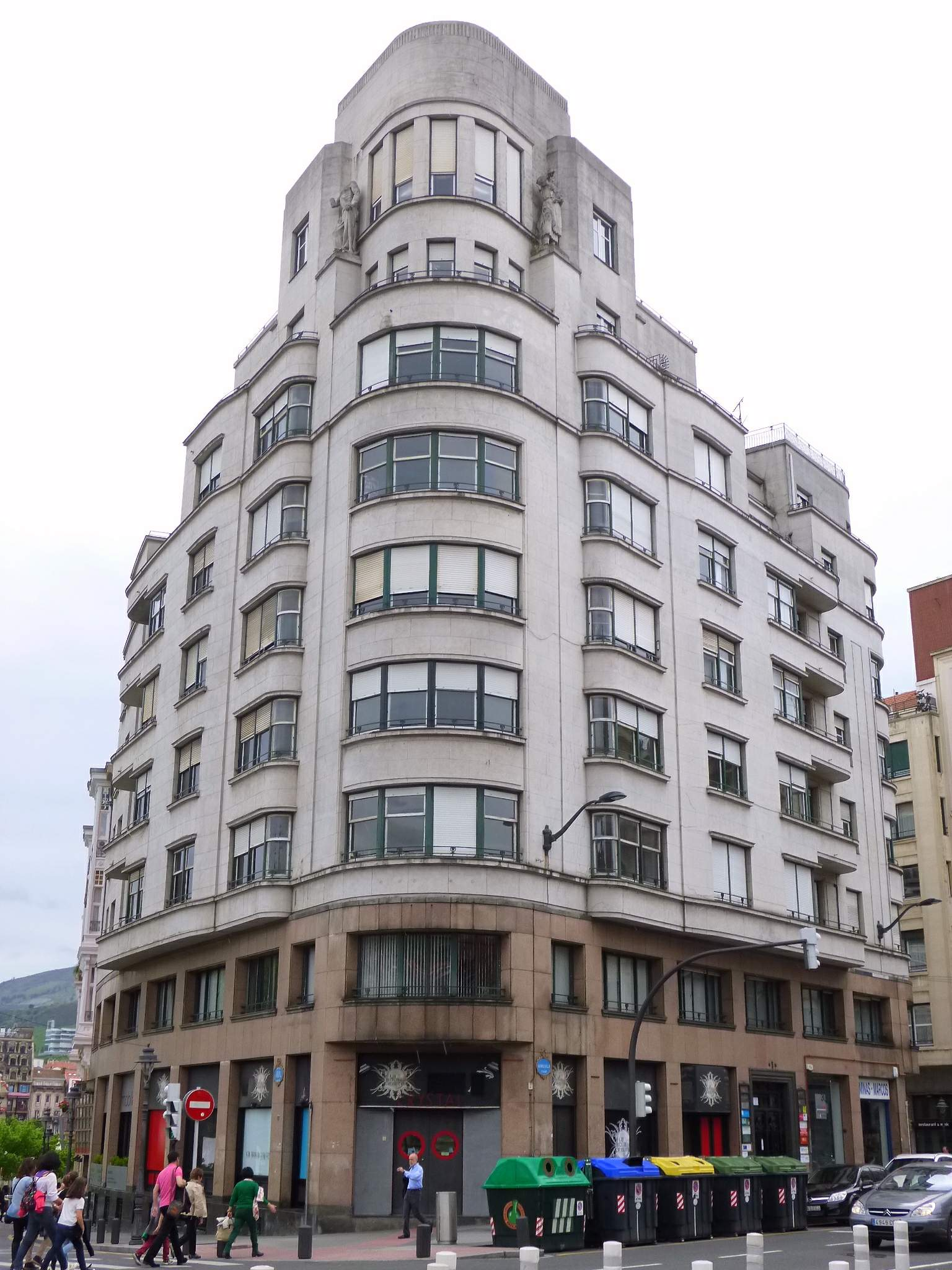 Edificio Aviación y Comercio (Bilbao)